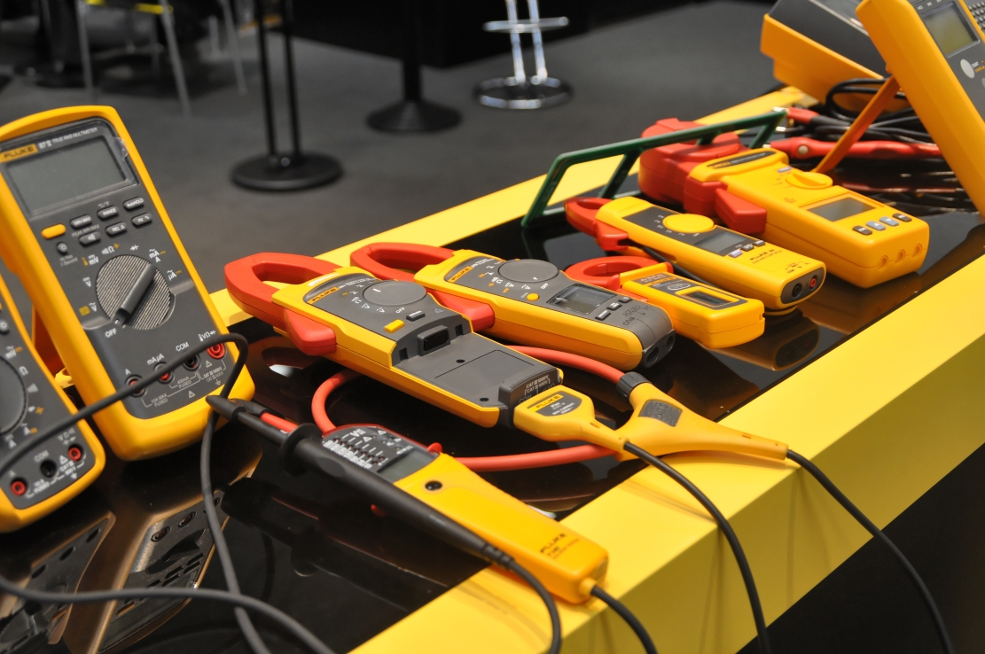 Hannover-Messe April 2012 Dieses Foto entstand durch die Mithilfe des gemeinnützigen Vereins Skillshare bei der Akkreditierung als Fotograf. Infos unter skillshare.eu Skillshare e.V. ist ein eingetragener gemeinnütziger Verein zur Förderung der Bildung durch Unterstützung der Erstellung, Sammlung und Verbreitung so genannten freien Wissens. IBAN: DE16 8306 5408 0004 8850 66 BIC: GENODEF1SLR Bank: VR-Bank Altenburger Land